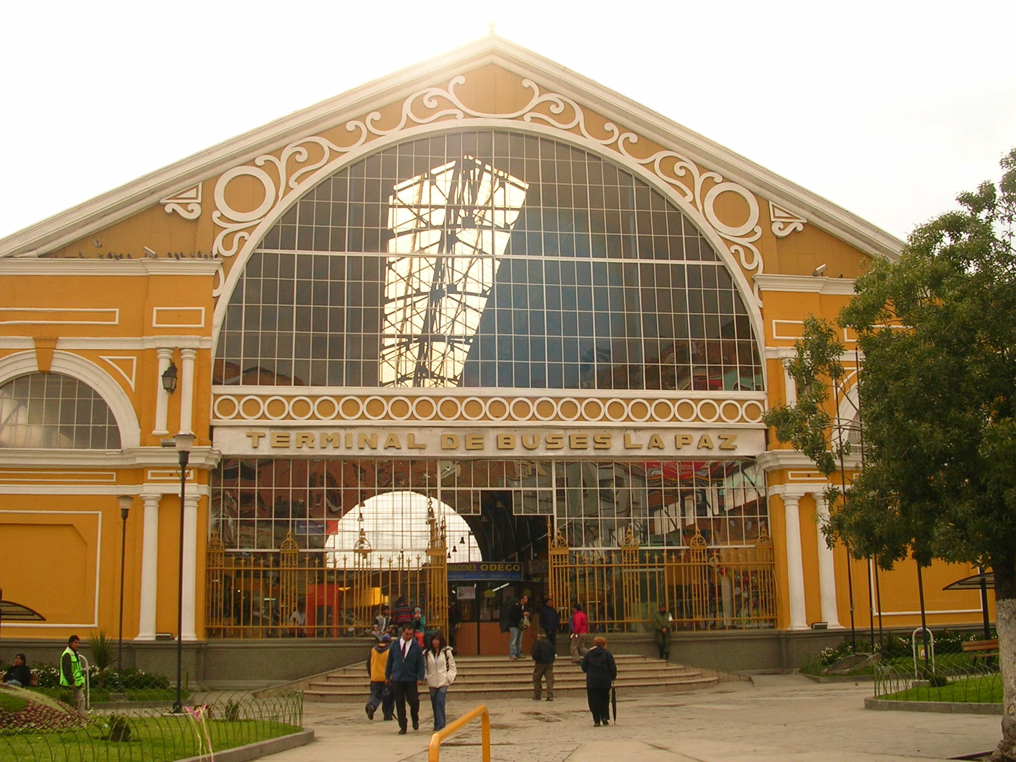 Terminal de Autobuses de La Paz